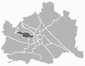 Positionskarte des 16. Wiener Gemeindebezirks Unter Verwendung einer Vorlage von Extrawurst. Public Domain.